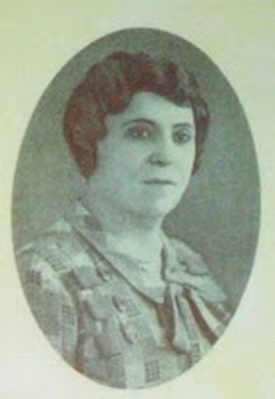 Professora Mariana Coelho